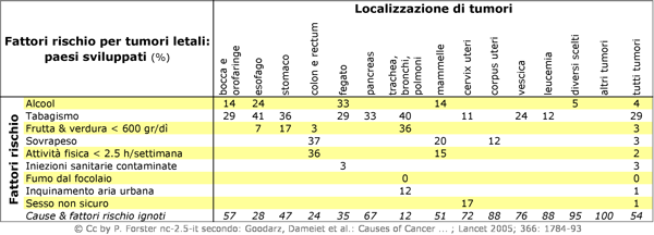 Tabella: Medicina, Epidemiologia, Patologia, Malattie, Oncologia, tumore, cancro; mondiale; Fattori rischio: Alcool, Tabagismo, Frutta & verdura scarsa, Sovrapeso, Attività fisica scarsa, Iniezioni sanitarie contaminate, Fumo dal focolaio, Inquinamento aria urbana, Sesso non sicuro; Tumori: bocca e orofaringe, esofago, stomaco, colon e rectum, fegato, pancreas, trachea, bronchi, polmoni, mammelle, cervix uteri, corpus uteri, vescica, leucemia, altri tumori, tutti tumori